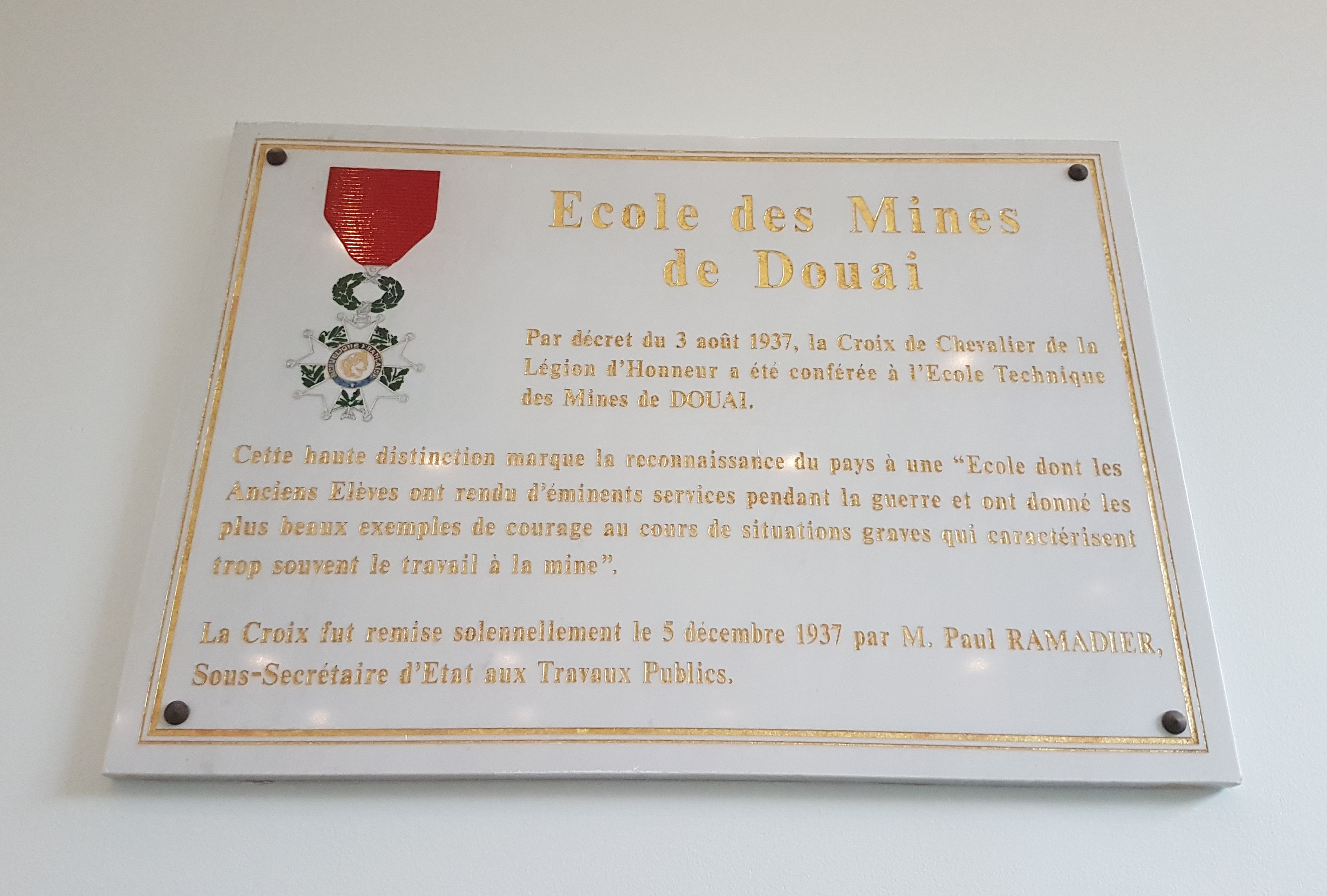 Elle se situe dans le hall principal de l'école.